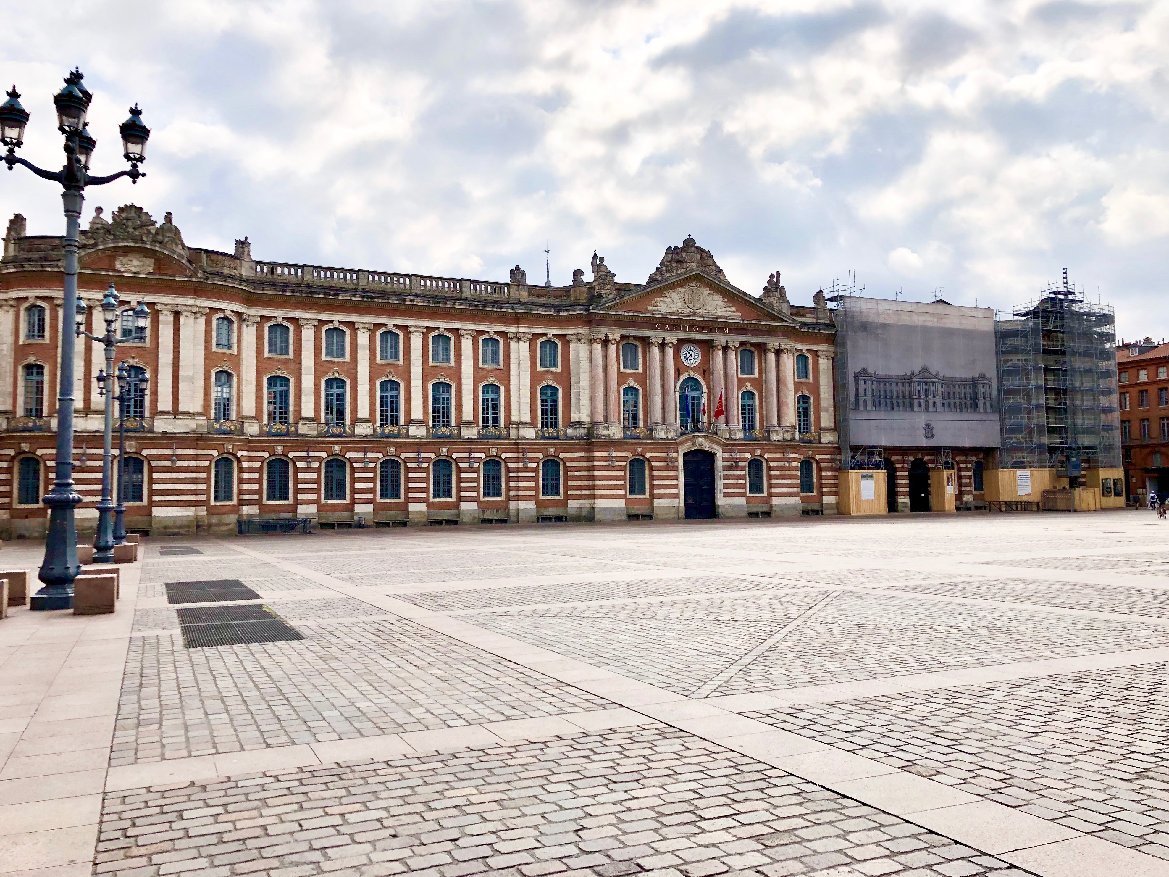 Place du Capitole à Toulouse durant la période de confinement